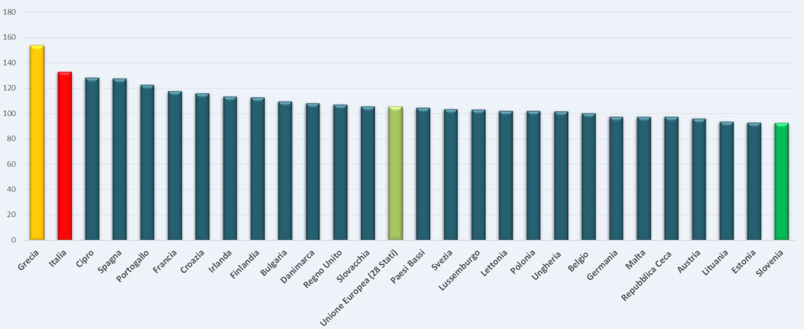 L’Indice europeo di equità intergenerazionale (UK)